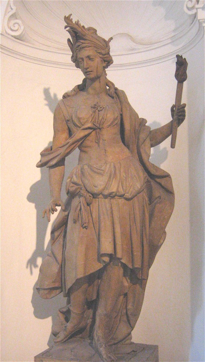 Johann Baptist Straub, Ceres, aus dem ehemaligen Palais Törring in München, um 1772, Bayerisches Nationalmuseum